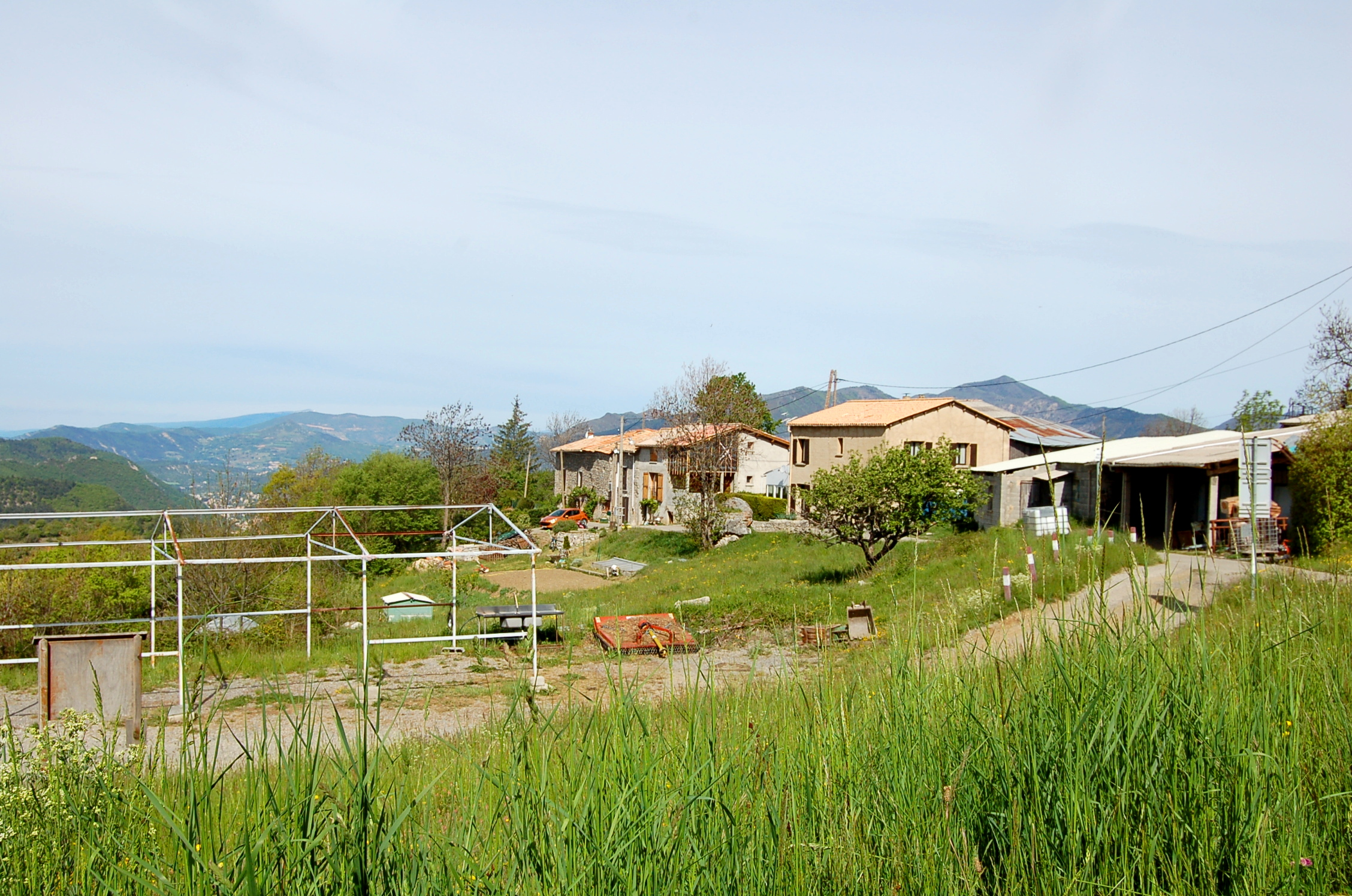 Le Villard des Dourbes vu depuis le boulodrome